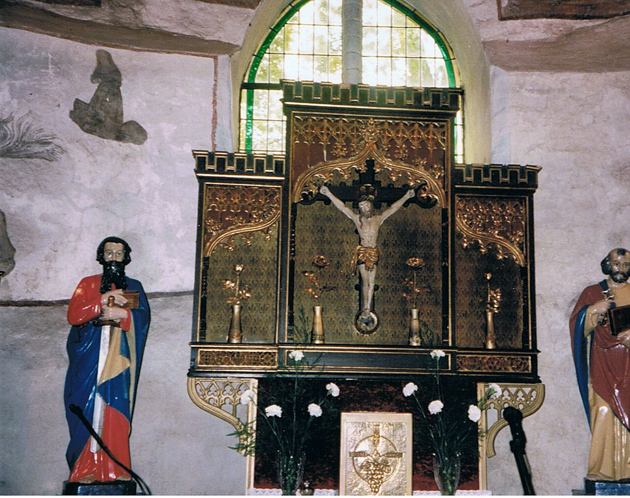 Grzędzice k. Stargardu Szczecińskiego - ołtarz